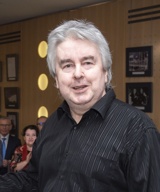 Teeneteristi kavaler Ivan Makarov